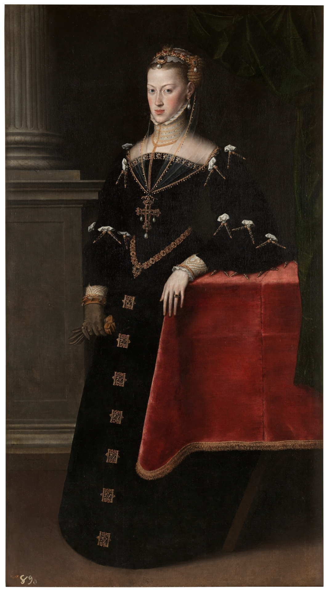 Retrato de la emperatriz María de Austria (1528-1603), que fue hija del emperador Carlos I de España y de Isabel de Portugal y esposa de Maximiliano II de Habsburgo, emperador del Sacro Imperio Romano Germánico.